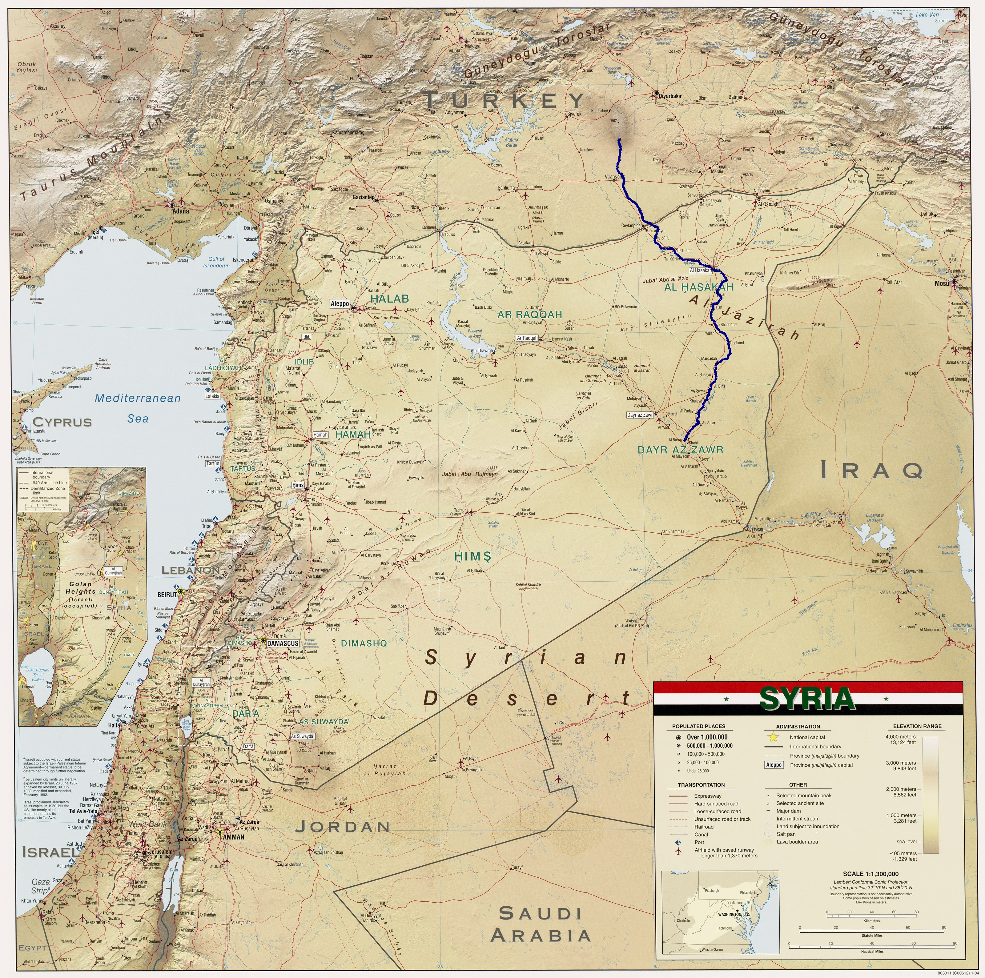 תווואי נהר חבור. מקור:File:Syria 2004 CIA map.jpg